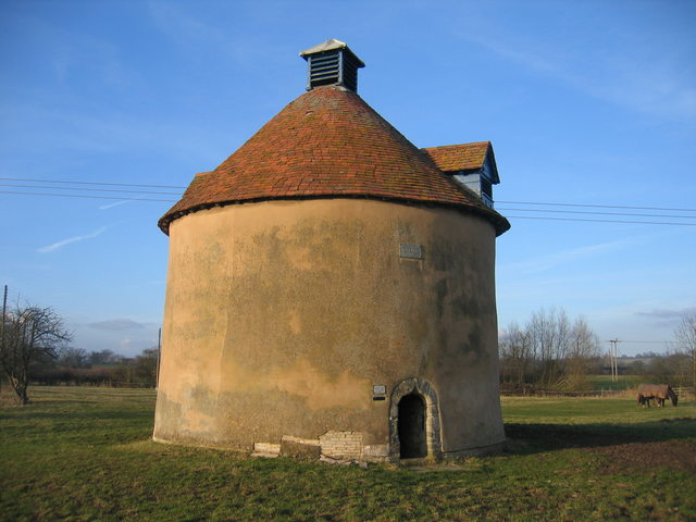 Kinwarton Dovecote